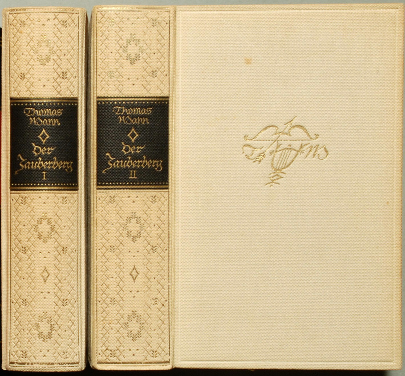 Thomas Mann: Der Zauberberg. Roman. Berlin: S. Fischer 1924, 2 Bde. 578 u. 629 Seiten. Erstausgabe (Potempa D 3.1, Bürgin I 23, Wilpert/Gührig² 28). Orig.- Leinen 19 x 12 cm.